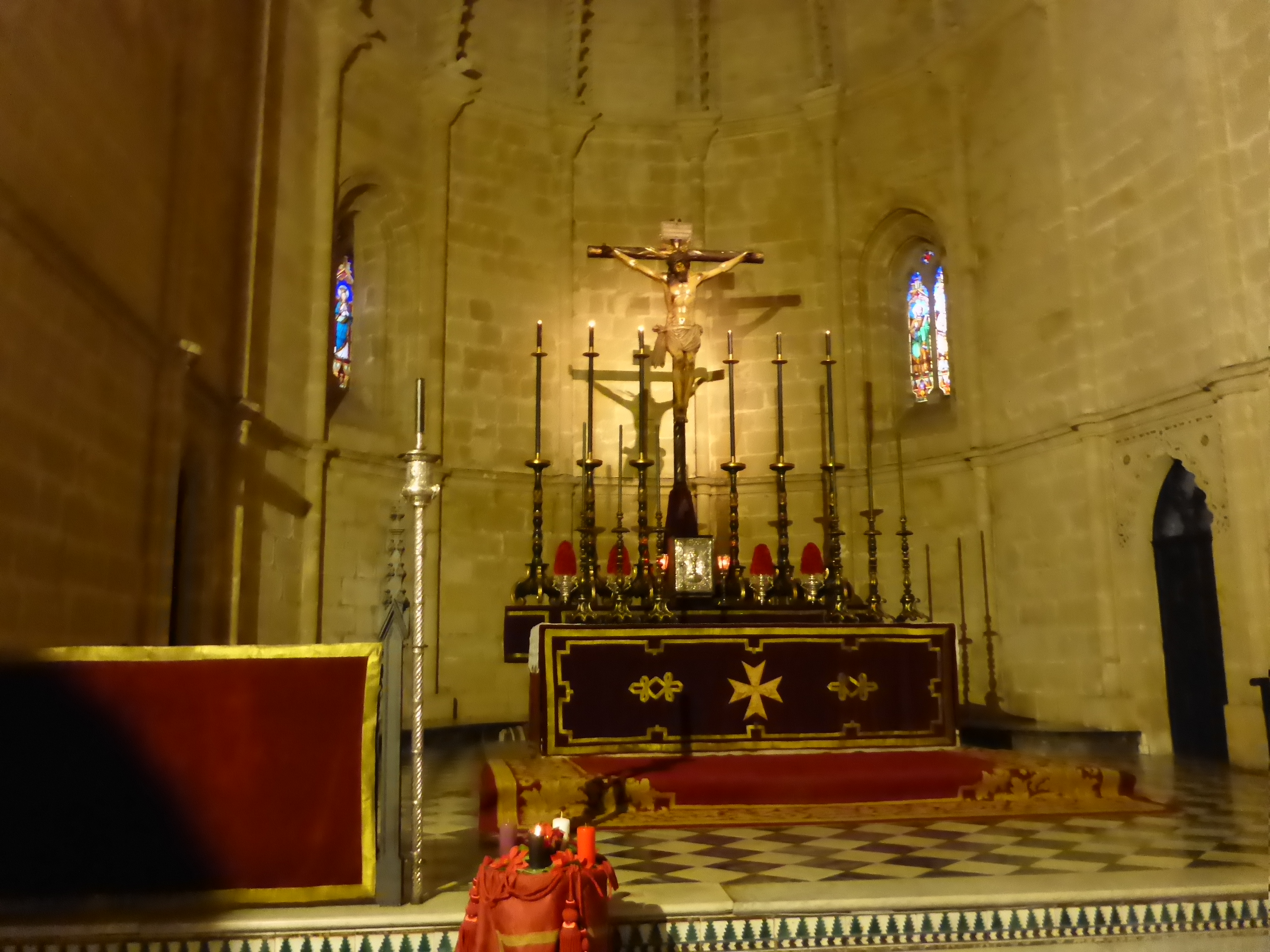 Interior de la Iglesia Church of San Juan de los Caballeros, Jerez de la Frontera (España)